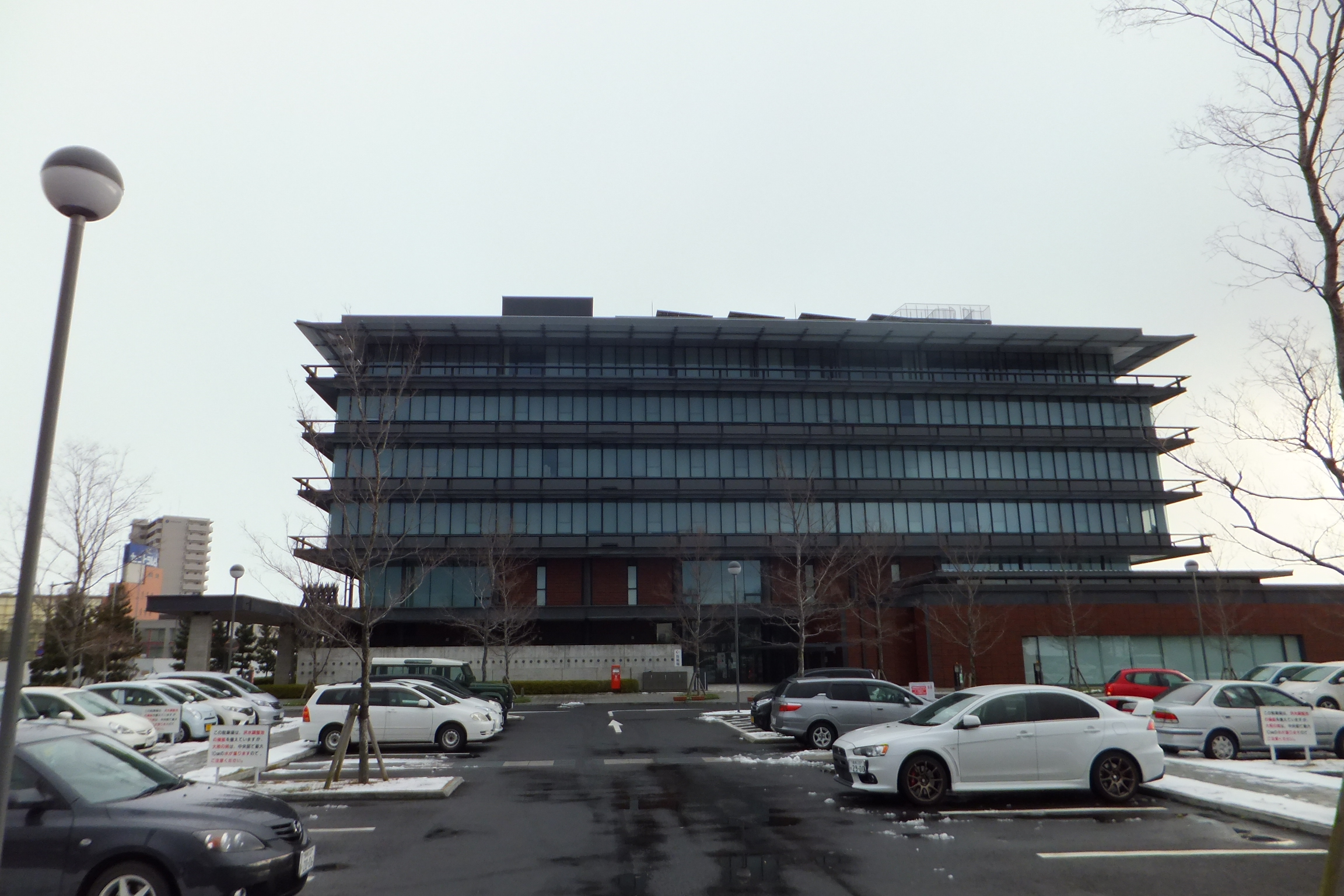 出雲市役所